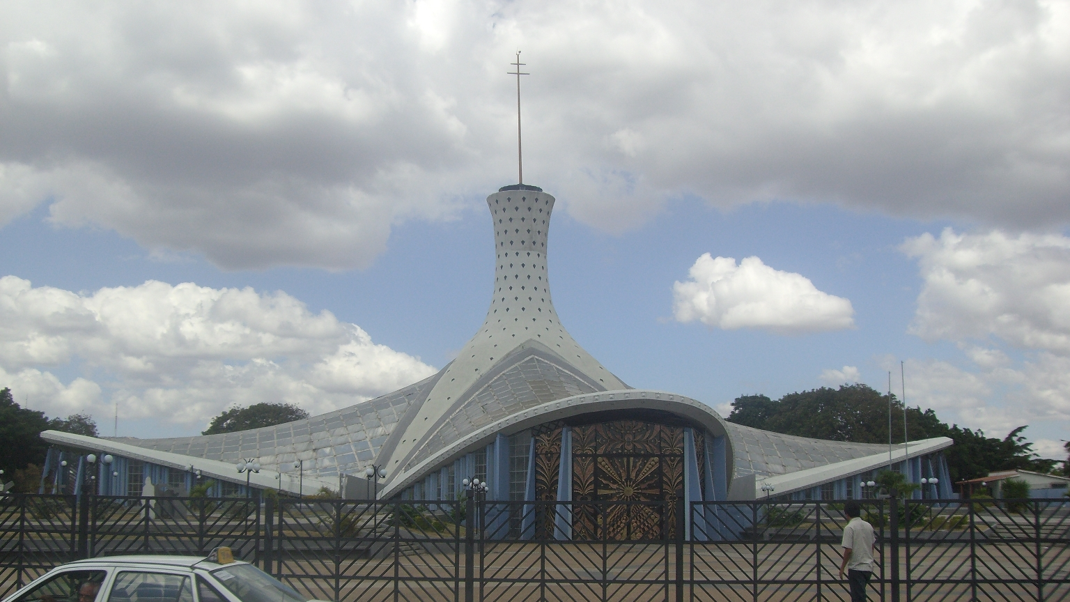 Catedral de Barquisimeto